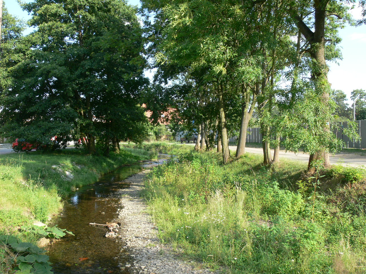 Dědice, Potoční, nad mostem přes Malou Hanou